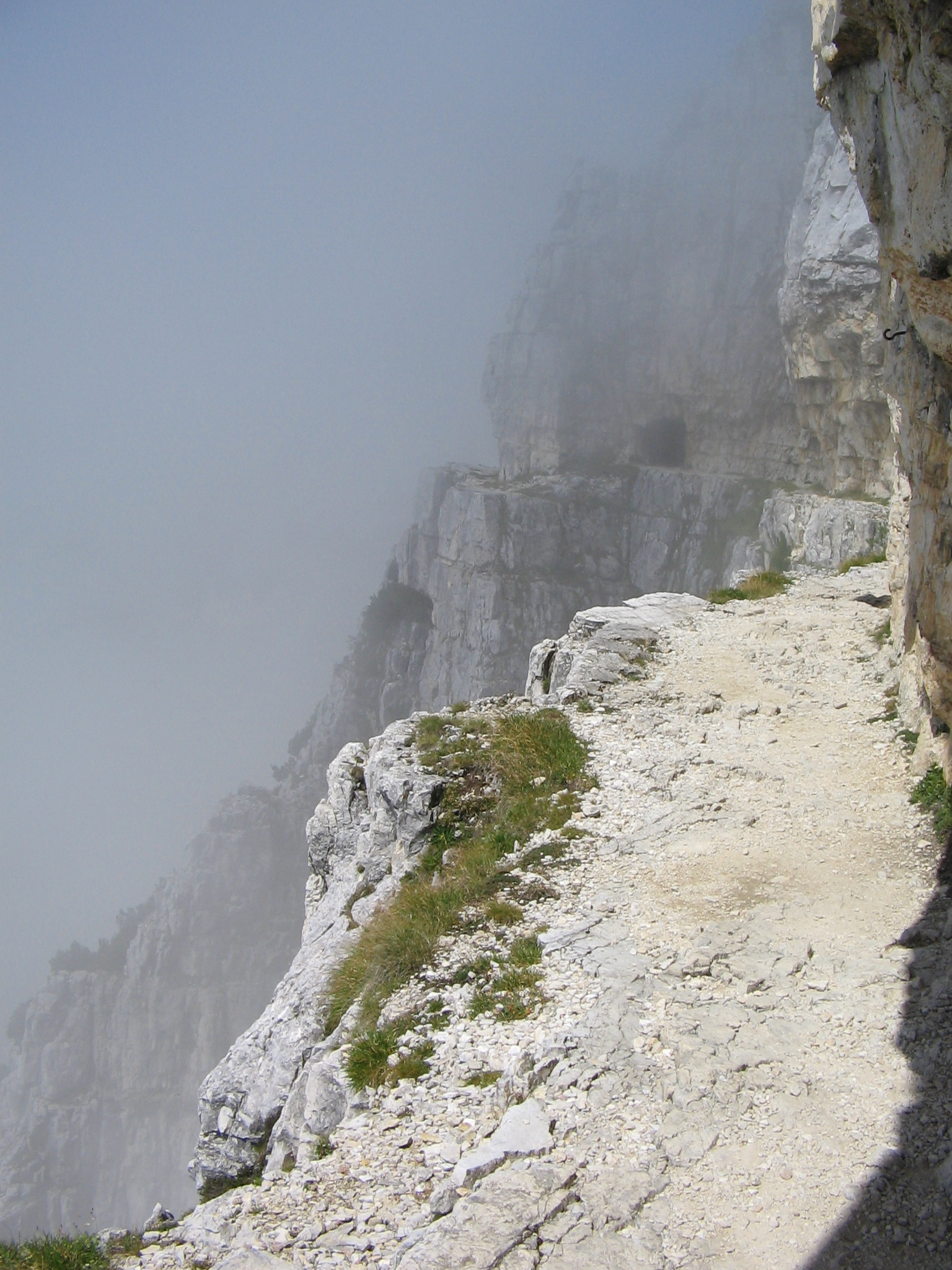 The last tunnels towards Rifugio Papa, Strada delle Gallerie, Pasubio